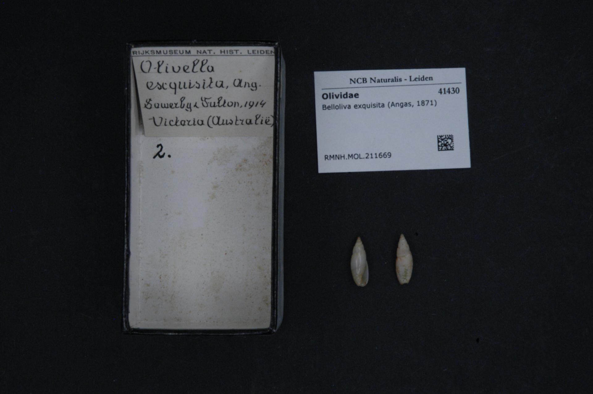 Belloliva exquisita (Angas, 1871)